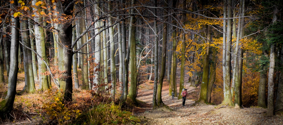 Bielsko-Biała szlak na Szyndzielnię